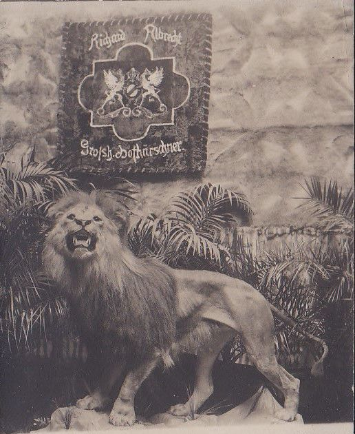 Dekoration des Richard Albrecht, Großherzoglicher Hof-Kürschner [in Karlsruhe?]. Präparierter männlicher Löwe, Hausfahne mit Wappen, im Hintergrund eine Decke aus Guanakofell. Handschriftlich, Rückseite der Karte: Mein Meisterstück: 1913, ausgestopft durch F. Albrecht für eine Ausstellung in Karlsruhe. Gedruckt oder Fotoabzug von Atelier Electra, Freiburg i. B., Bursengang.